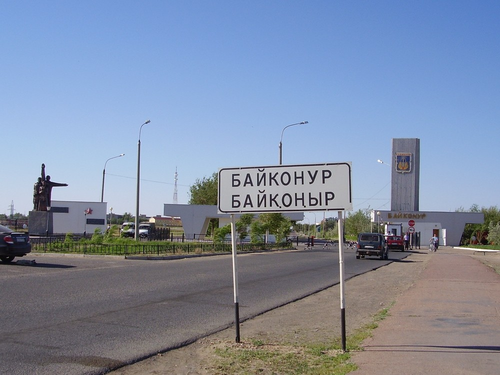 КПП на въезде в город Байконур со стороны посёлка Тюра-Там